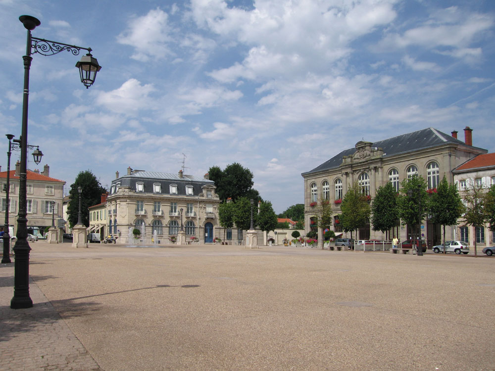 Place Léopold, Lunéville, cliché personnel, été 2005 Utilisateur:Grain de sel Catégorie:Image de commune de Meurthe-et-Moselle